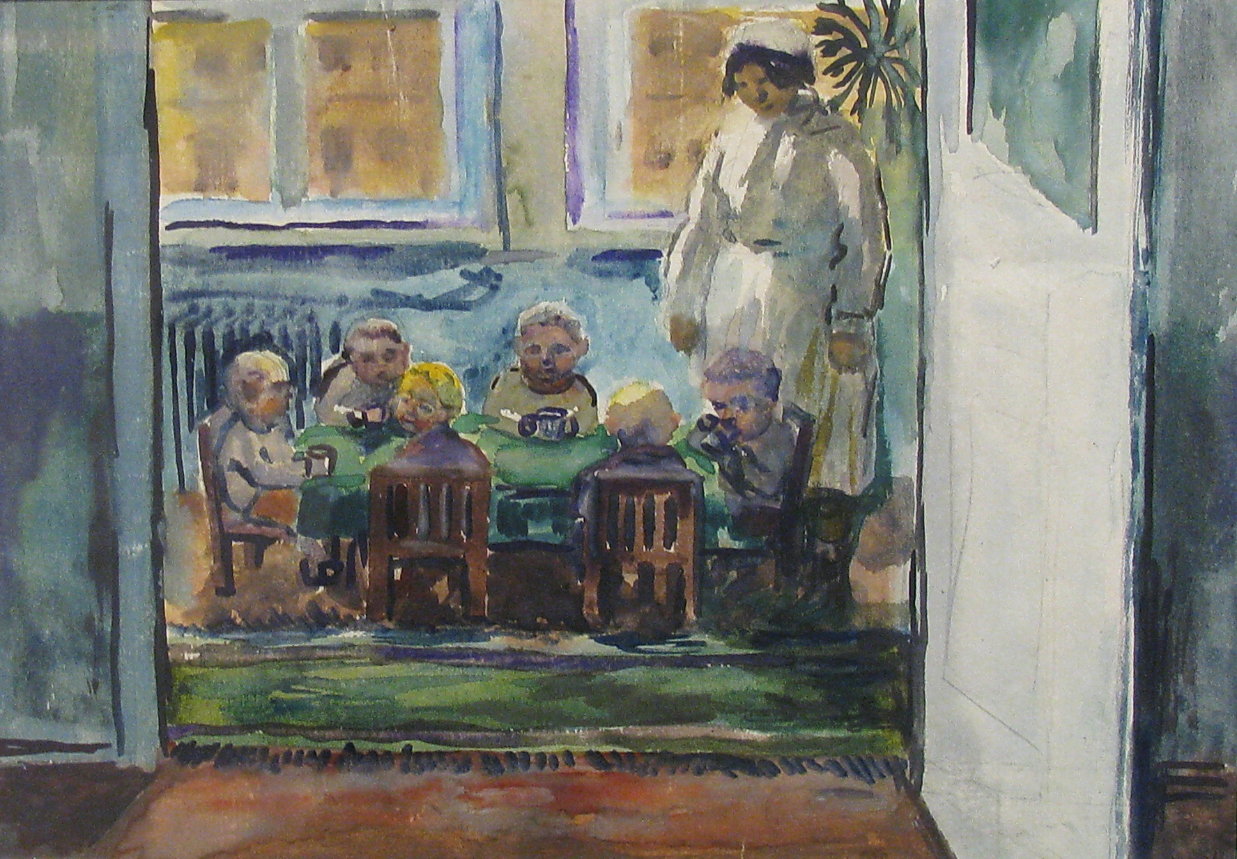 Міхаіл Філіповіч. Дзіцячы сад. Папера, акварэль (здымак праз шкло)